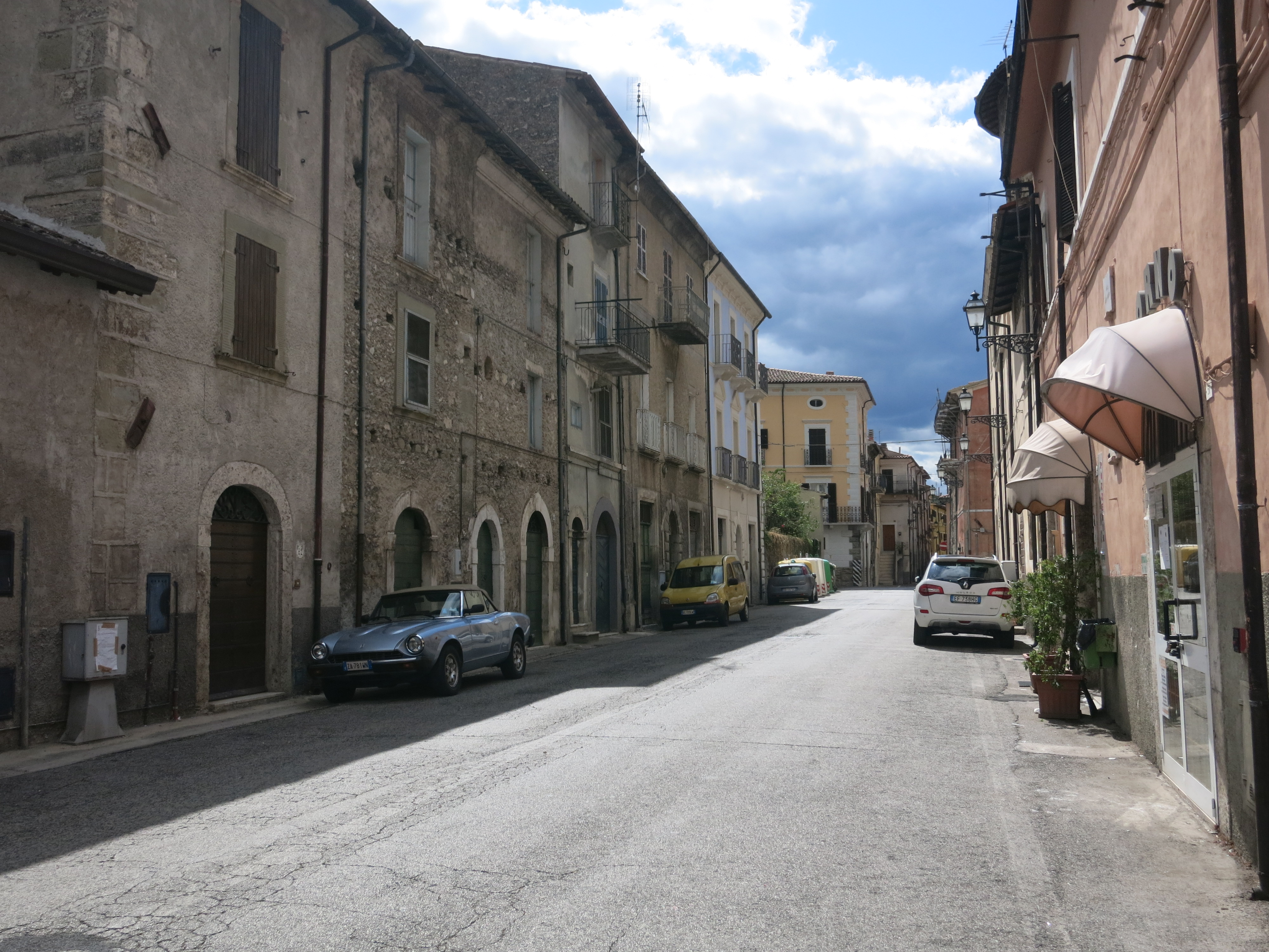 La strada provinciale 14, vecchio percorso della SS4 Via Salaria prima della costruzione della variante esterna al centro abitato, attraversa il paese di Borgo Velino (provincia di Rieti, Lazio)